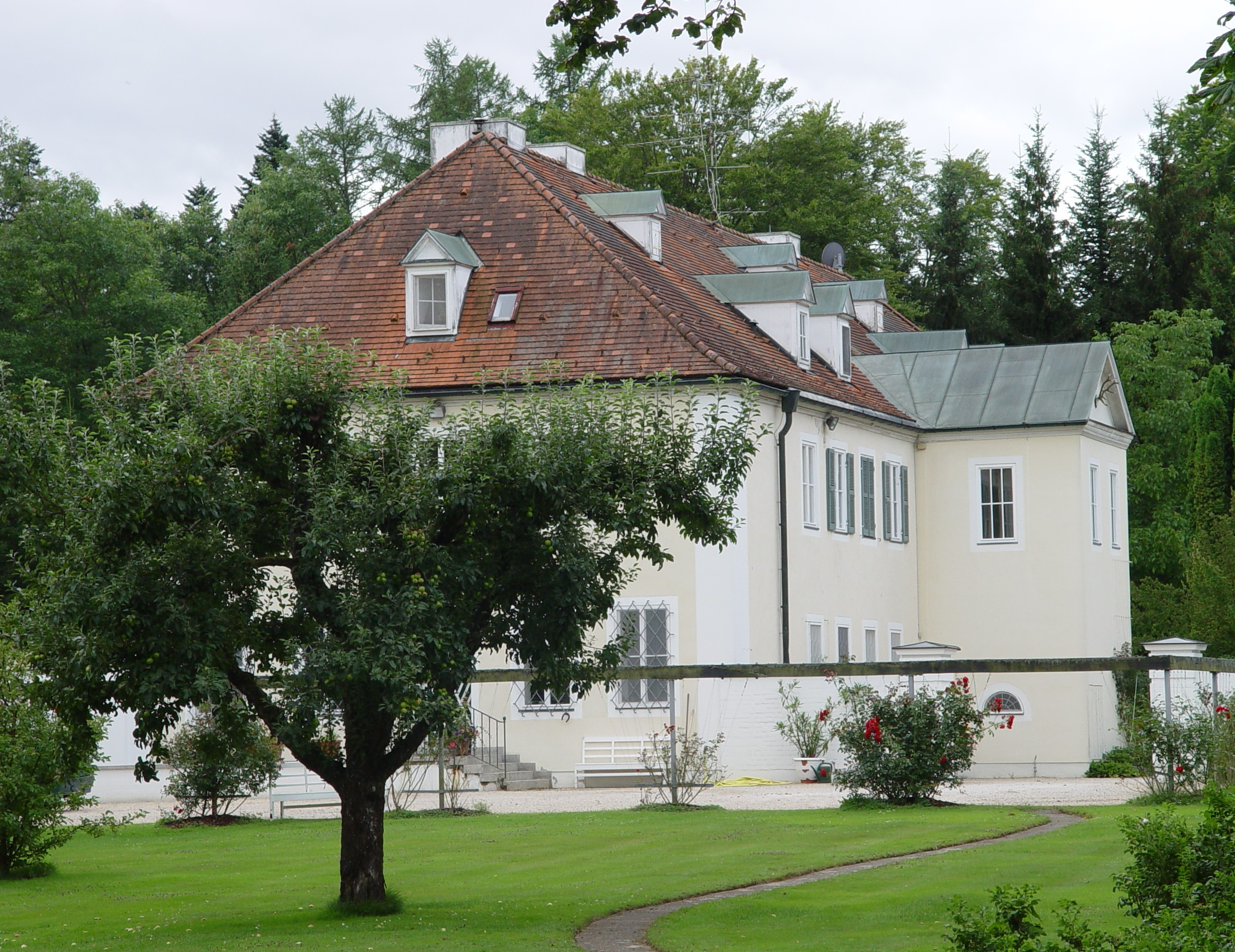 Landhaus im Wildpark Josefslust bei Sigmaringen